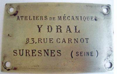 Ancienne plaque adresse de la société YDRAL